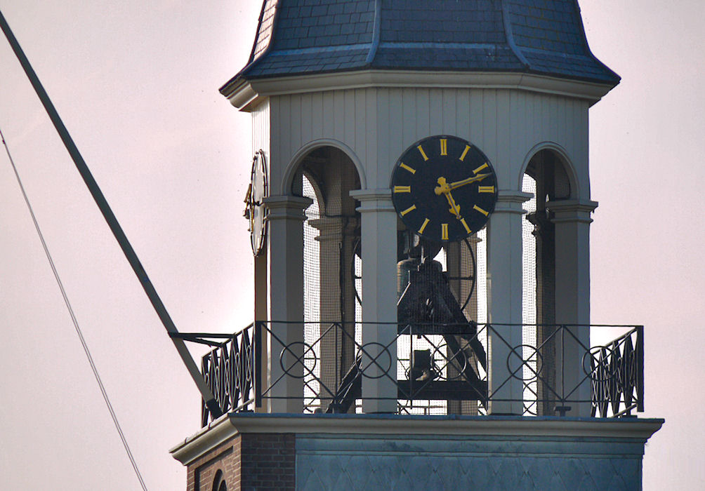 In de toren van de Nederlands Hervormde Kerk (Grote Kerk), die zelf niet beschermd wordt, bevindt zich een belangrijke historische luidklok, diameter 82,5 cm. !4e eeuw